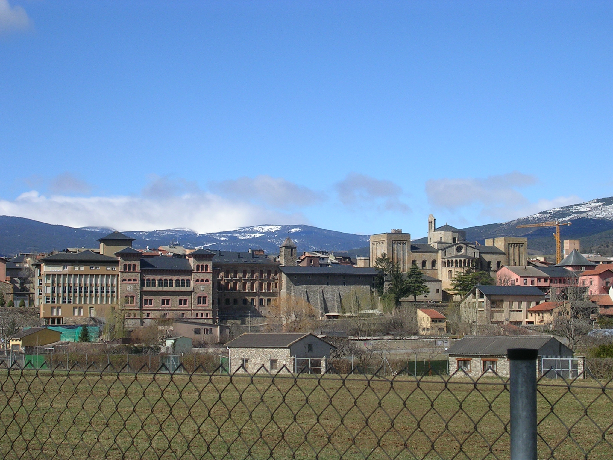 Vue du village de la Seu d'Urgell (Catalogne - Nord de l'Espagne)